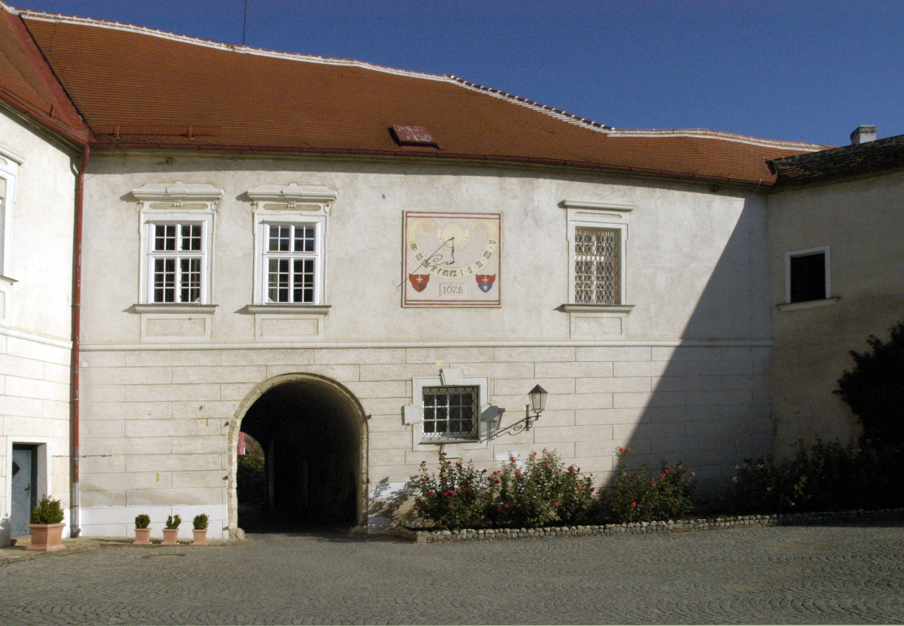 Schloss Mailberg mit Grabenanlage und Johannes-Nepomuk-Bildstock (Detail Tortrakt vom Innenhof aus gesehen)